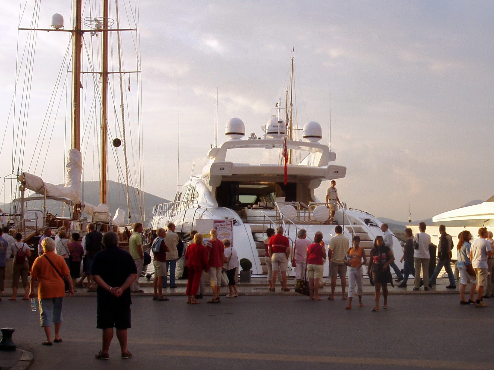 Eine Yacht legt im Hafen von St. Tropez an. August 2005